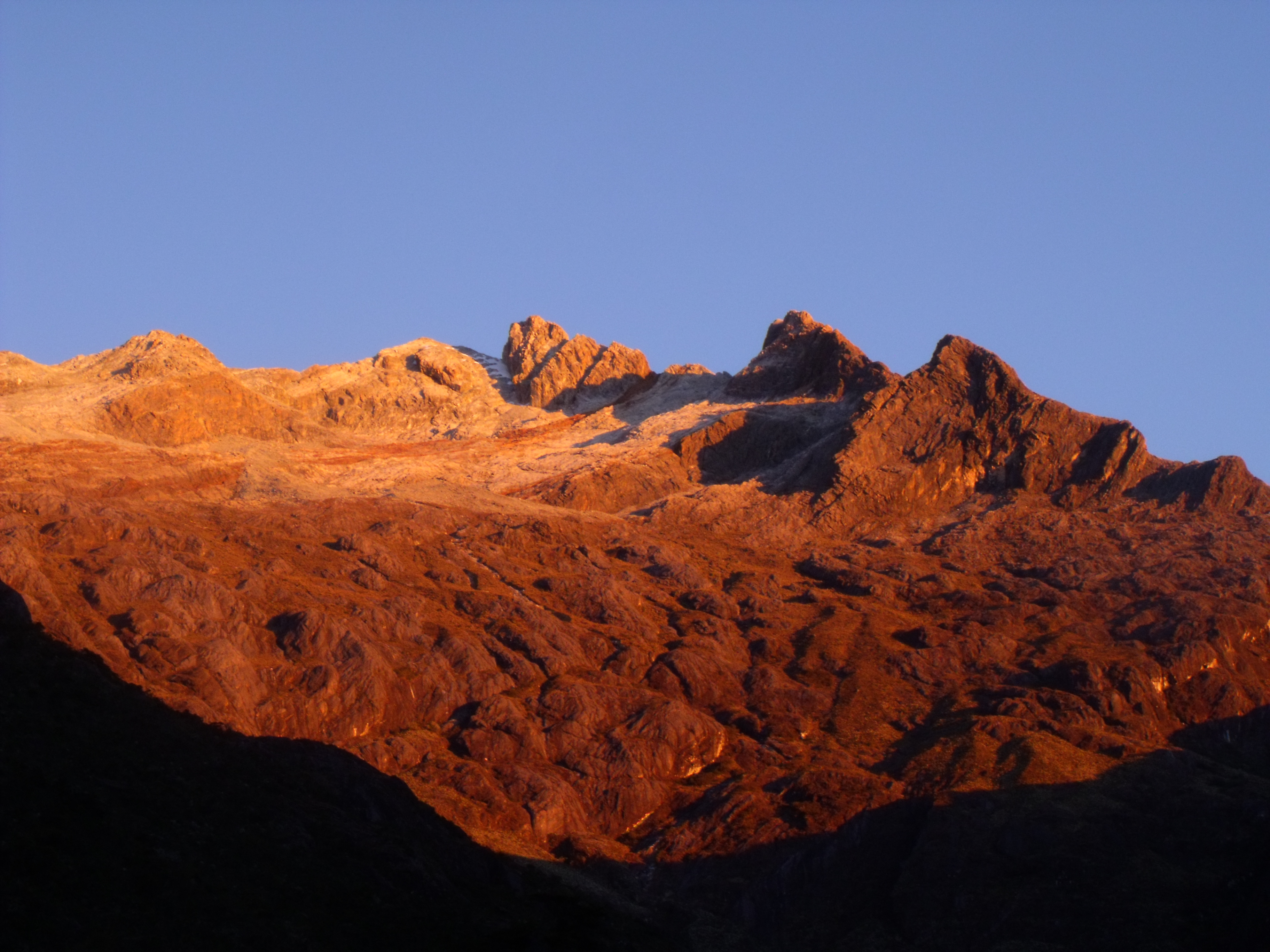 Vista del segundo pico más alto de la Sierra Nevada de Mérida